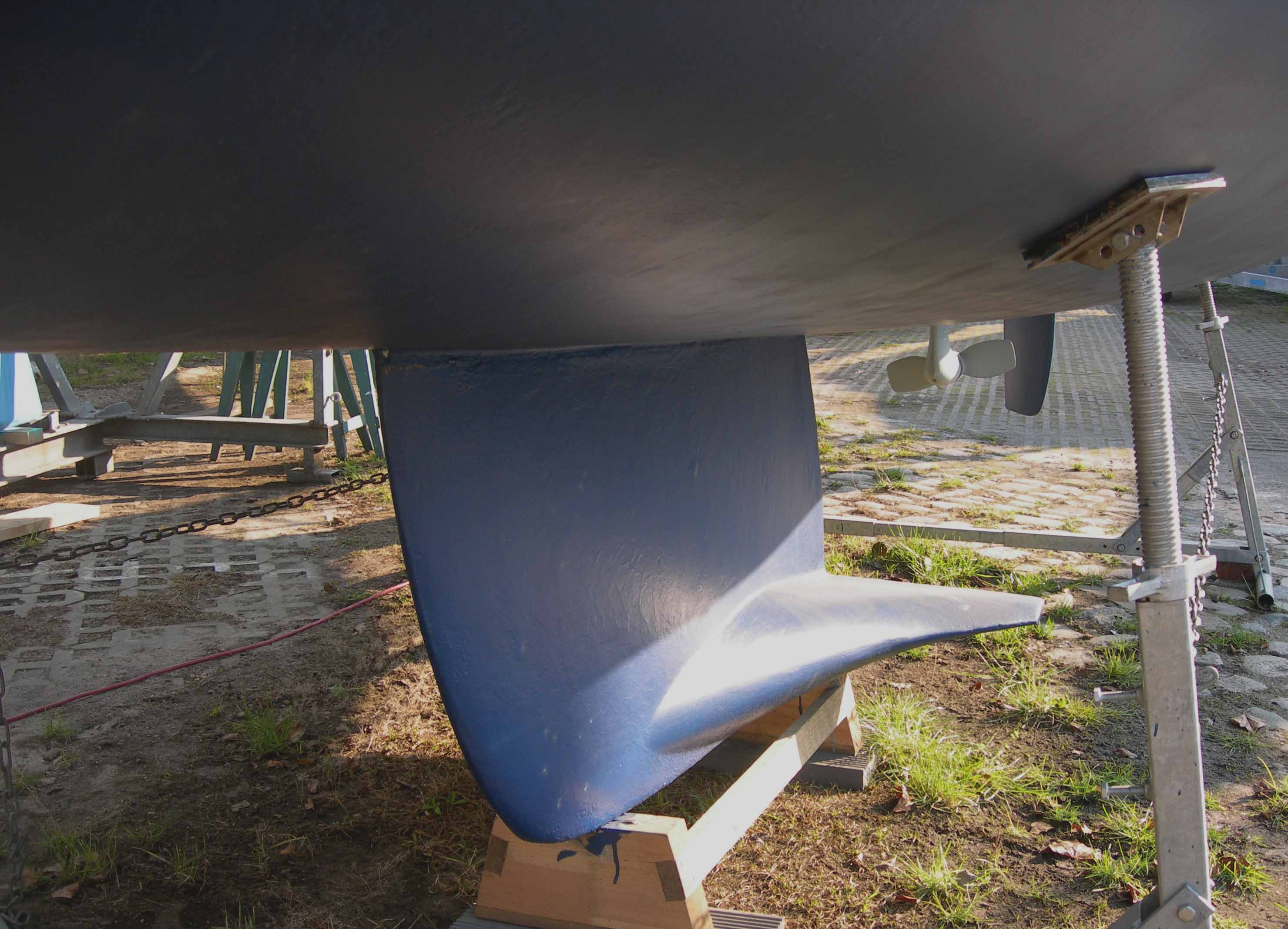 Flügelkiel, Yachtkiel